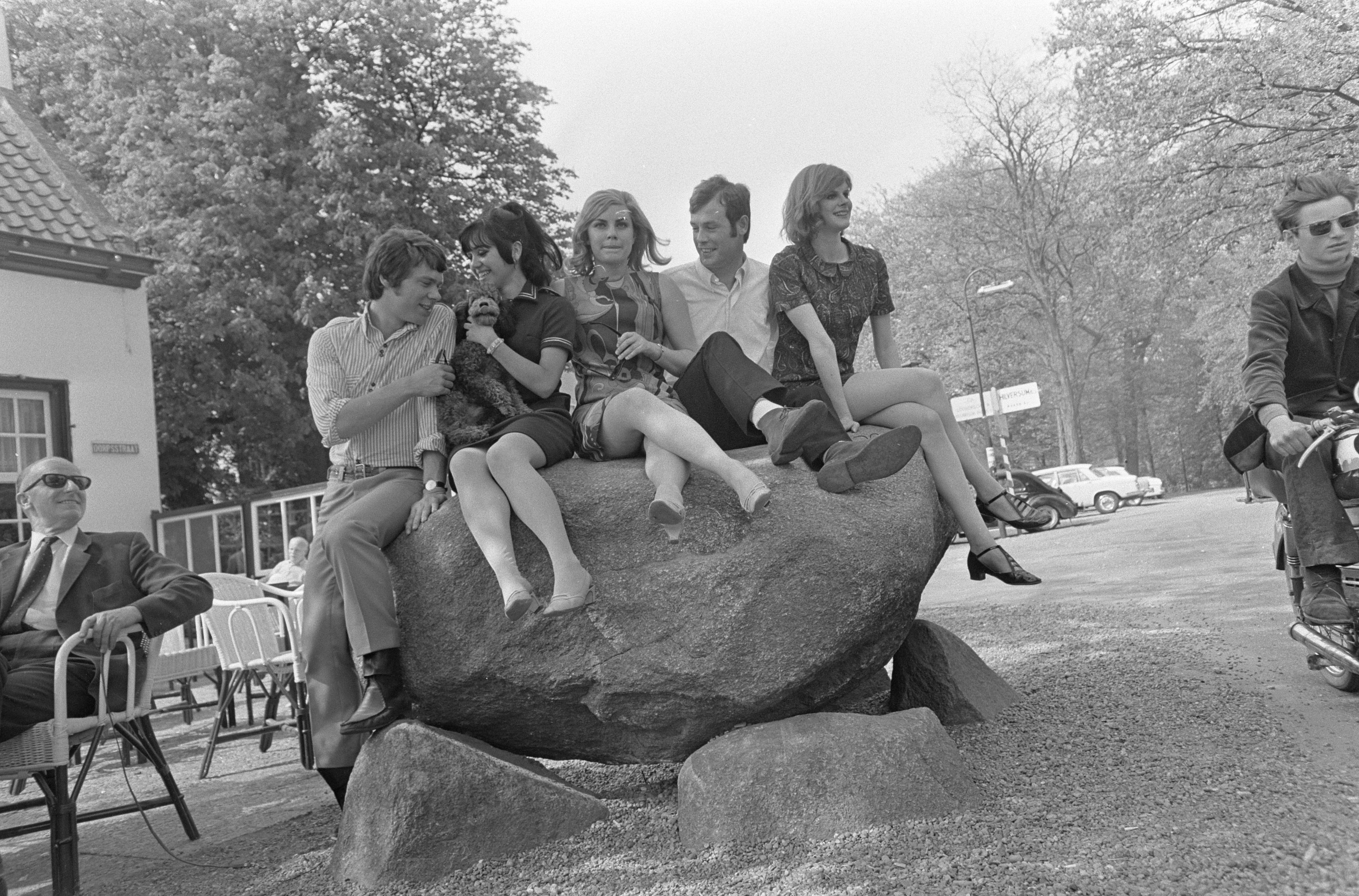 Collectie / Archief : Fotocollectie Anefo Reportage / Serie : [ onbekend ] Beschrijving : Nederlandse ploeg voor Knokke voorgesteld, v.l.n.r. Jerry Rix, Patricia Paay, Conny Vink, Andy Star en Marianne Delgorge Datum : 11 mei 1967 Trefwoorden : zangers Persoonsnaam : Delgorge, Marianne, Paay, Patricia, Rix, Jerry, Star, Andy, Vink, Conny Fotograaf : Kroon, Ron / Anefo Auteursrechthebbende : Nationaal Archief Materiaalsoort : Negatief (zwart/wit) Nummer archiefinventaris : bekijk toegang 2.24.01.05 Bestanddeelnummer : 920-3164